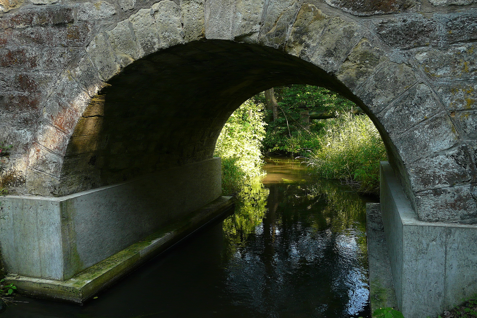 Potok Bělá pod viaduktem u Malého Rečkova